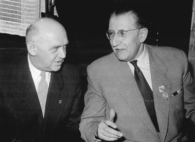 Friedensfahrt, Jouinard, Vaclev Kopetzki Zentralbild Kronfeld Bey-Ho 2.5.1955 - Vor der VIII. Internationalen Friedensfahrt Prag-Berlin-Warschau - Die letzten Tage und Stunden vor dem Start der VIII. Internationalen Friedensfahrt. UBz: Der Präsident der UCI, Joinard (rechts) im Gespräch mit dem Stellvertretenden Ministerpräsidenten der CSR Vaclev Kopetzki. Information added by Wikimedia users.Anmerkung: Der Präsident der UCI Achille Joinard (1947-57) ist der Herr Rechts.